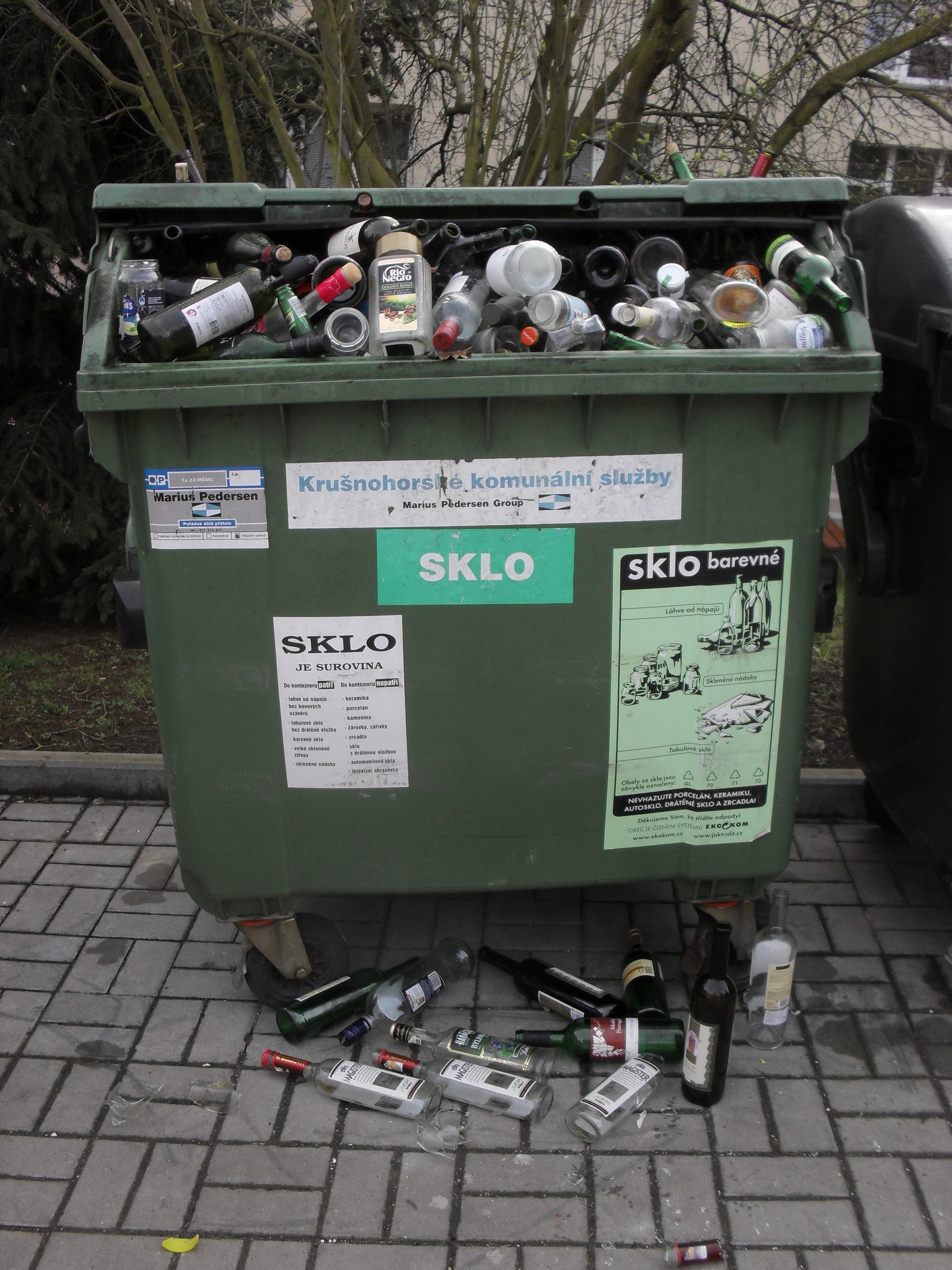 Přeplněný konteiner na tříděné sklo: pak že o recyklaci Tepličáci nestojí :)